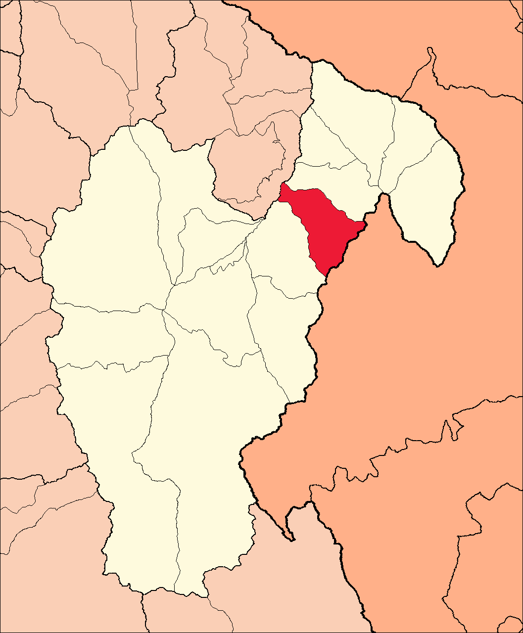 Área del distrito de Huacachi dentro de la provincia de Huari.